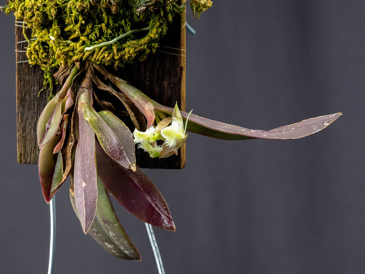 Epidendrum moronense